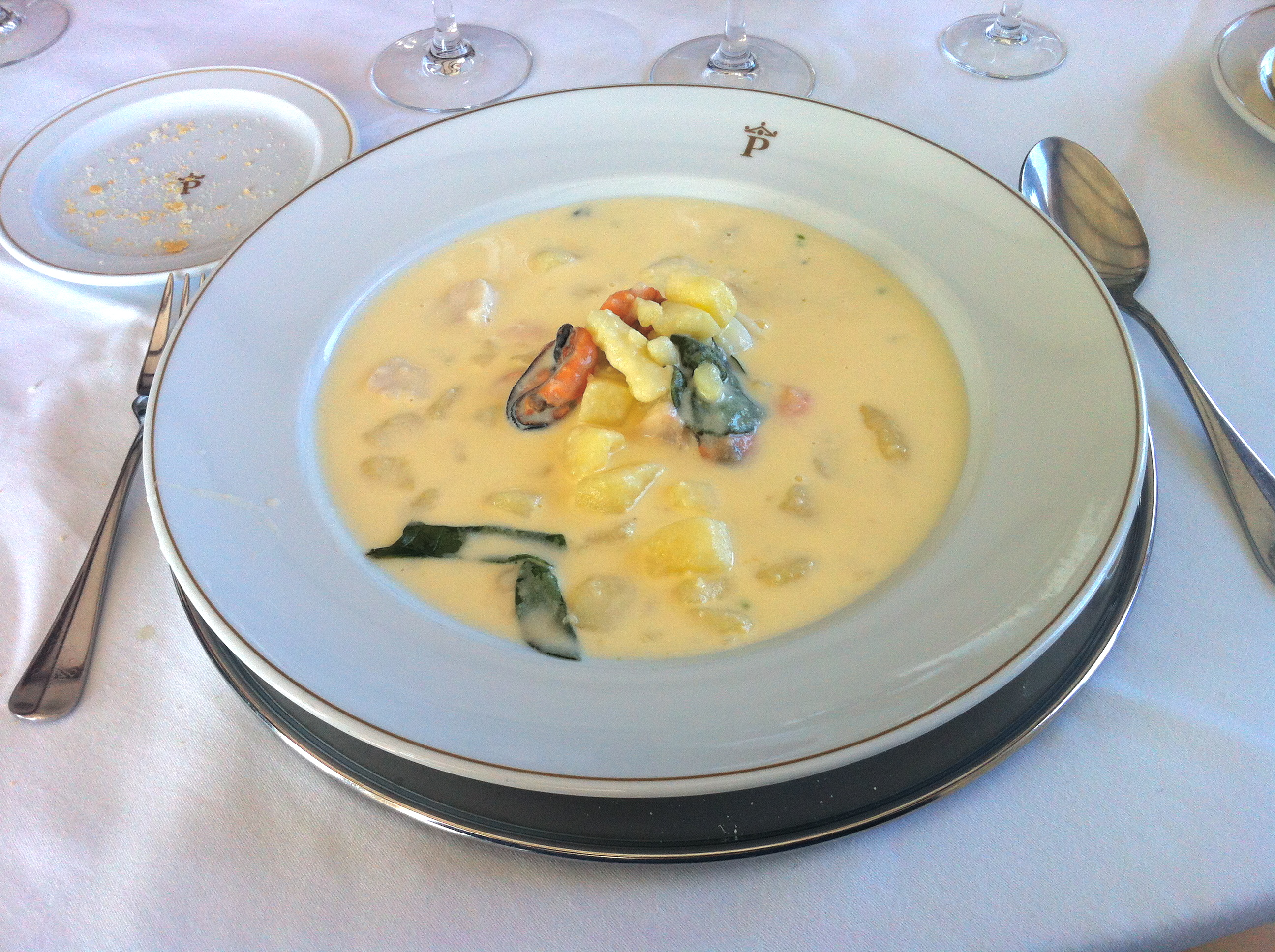 Gazpachuelo - in Málaga enthält diese heiße Suppe Fisch, Muscheln, Kartoffeln und Mayonnaise - Parador de Málaga